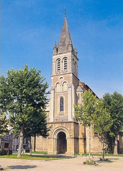 Église Saint-Nicolas à Nogaro